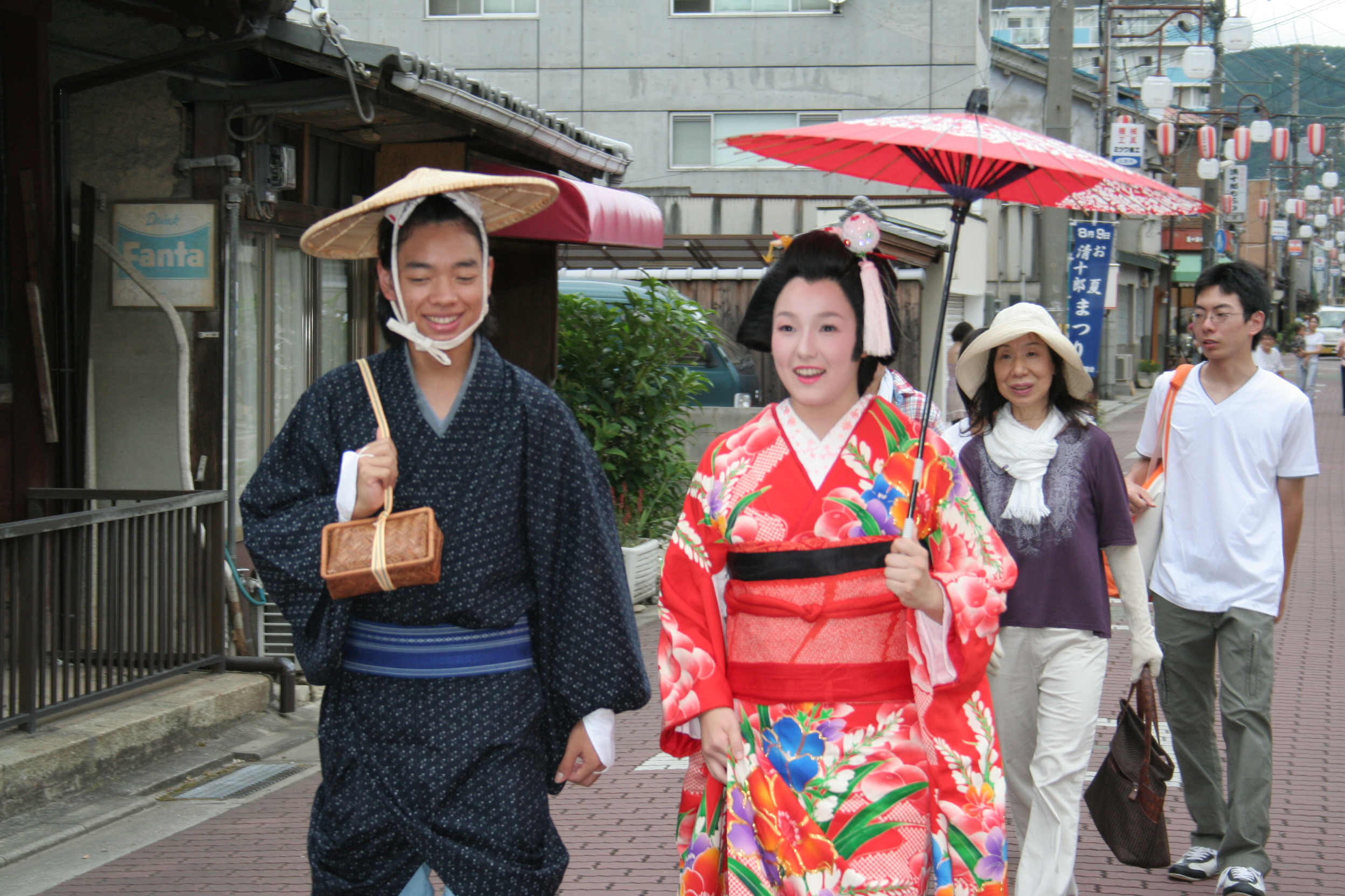 お夏清十郎祭。毎年8月に行われる姫路市の夏祭り。江戸時代の作家井原西鶴や近松門左衛門の著作物のモデルとなった今は慶雲寺にあるお夏と清十郎の比翼塚に眠る二人を弔うための祭である。